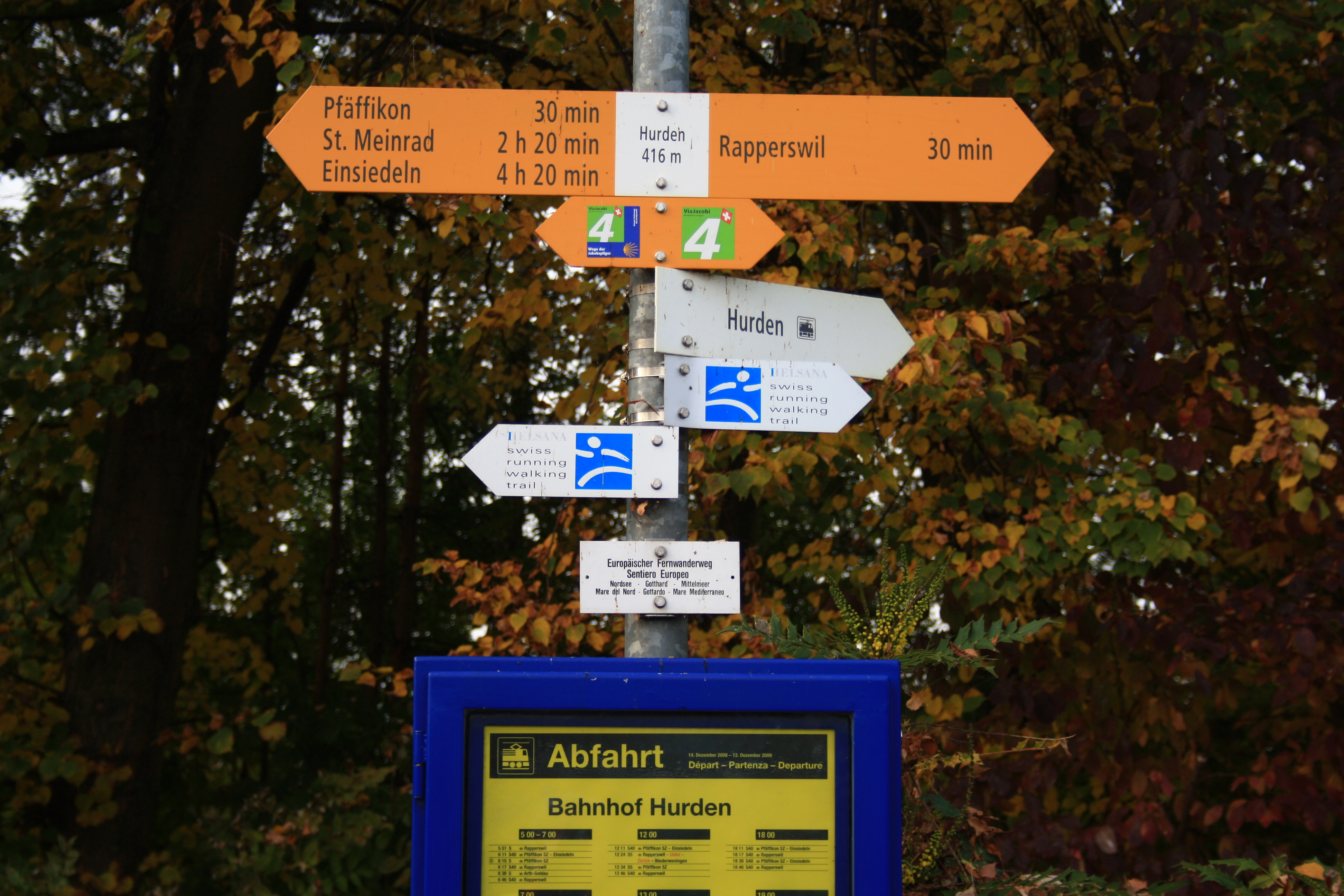 Fernwanderweg in Hurden (Switzerland)